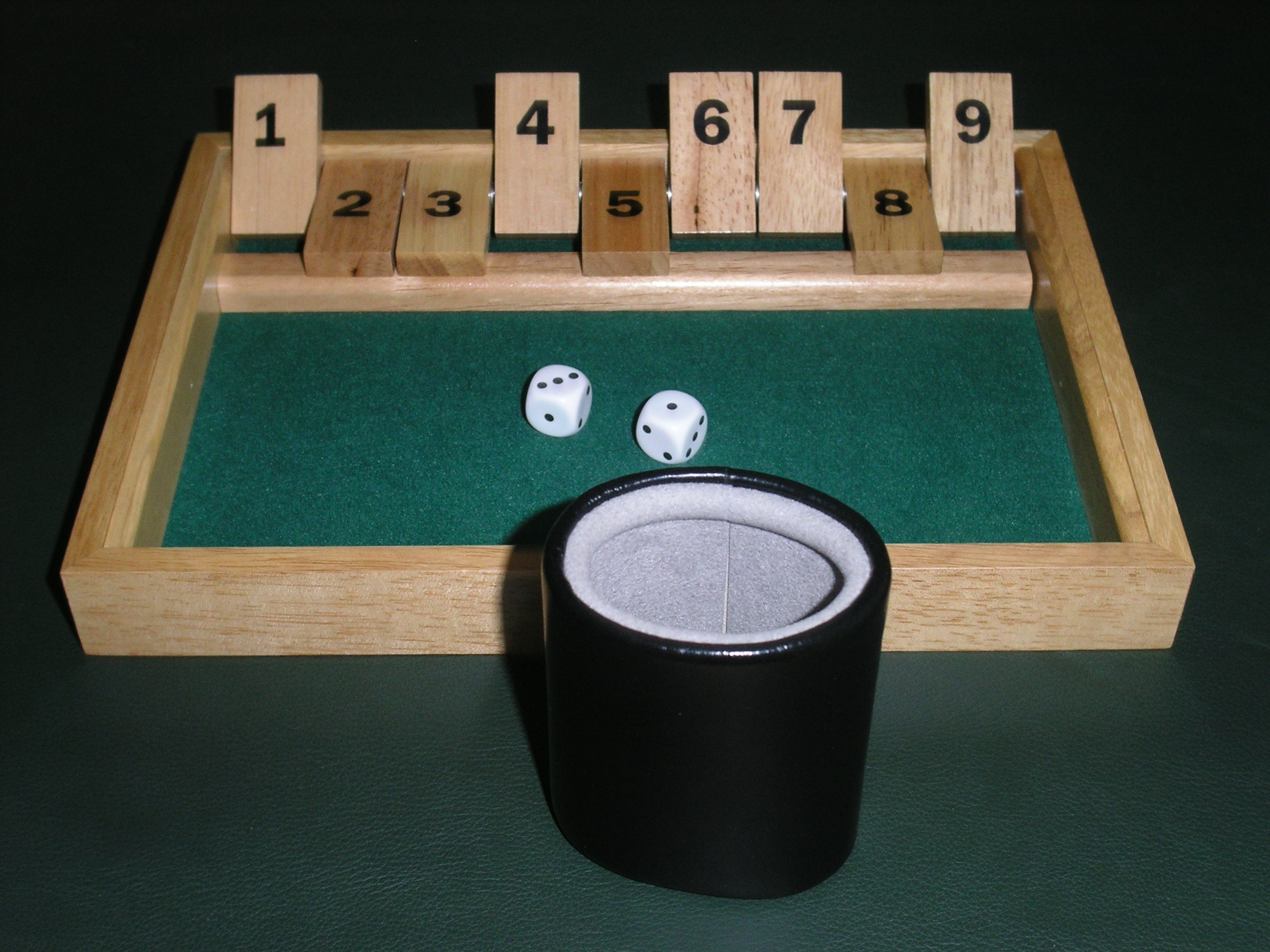 Shut the Box